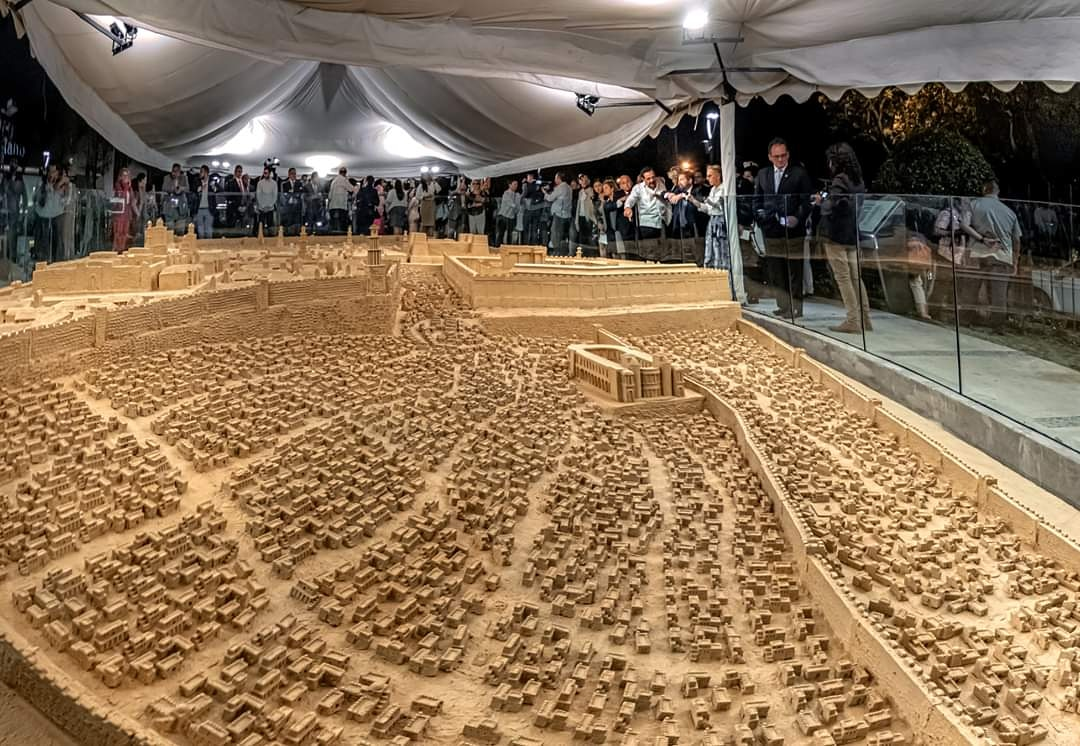 Inauguración Parque Jerusalén de Guayaquil, vista de la réplica de la ciudad a escala y visitantes.